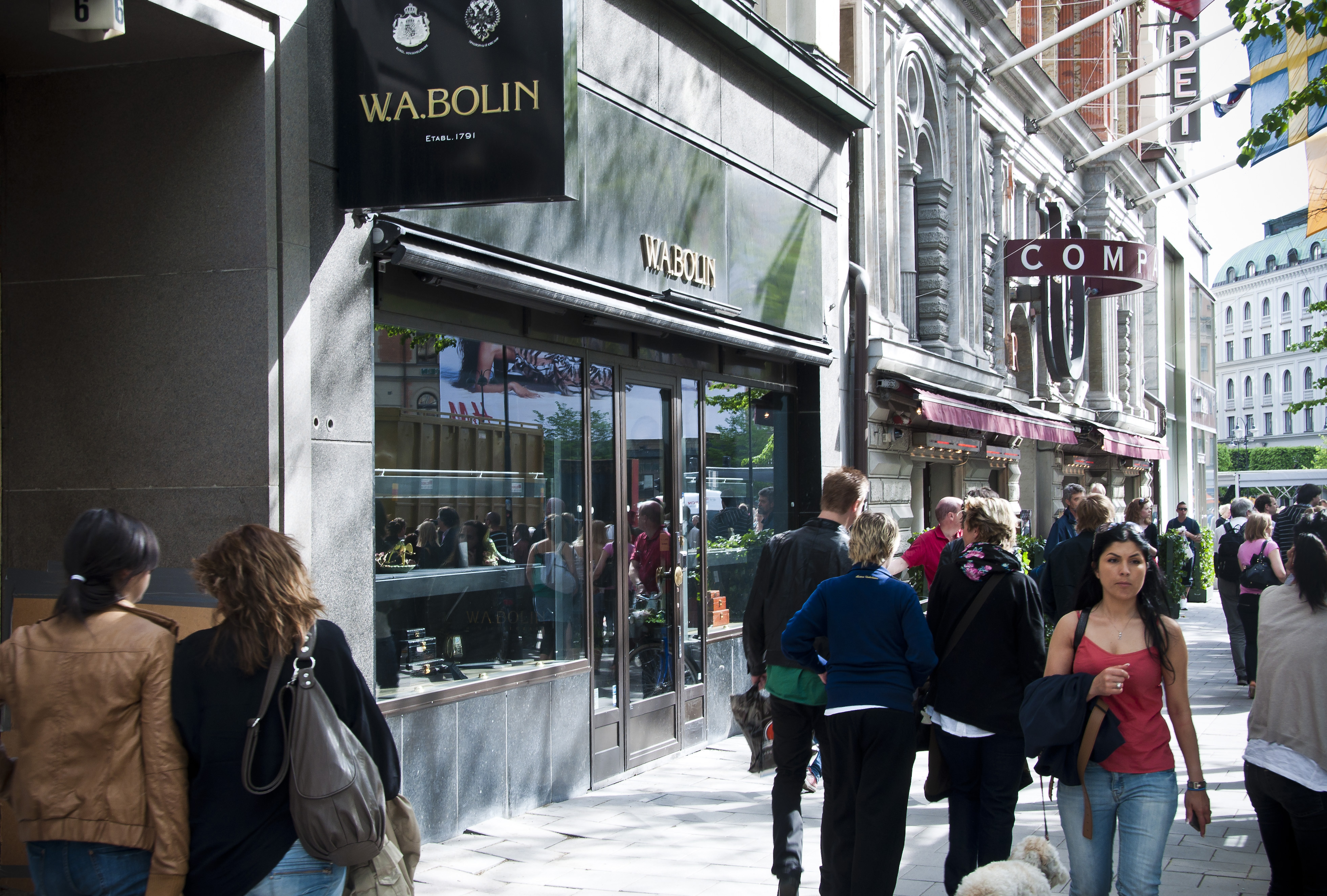 W A Bolins affär på Sturegatan 6 i Stockholm